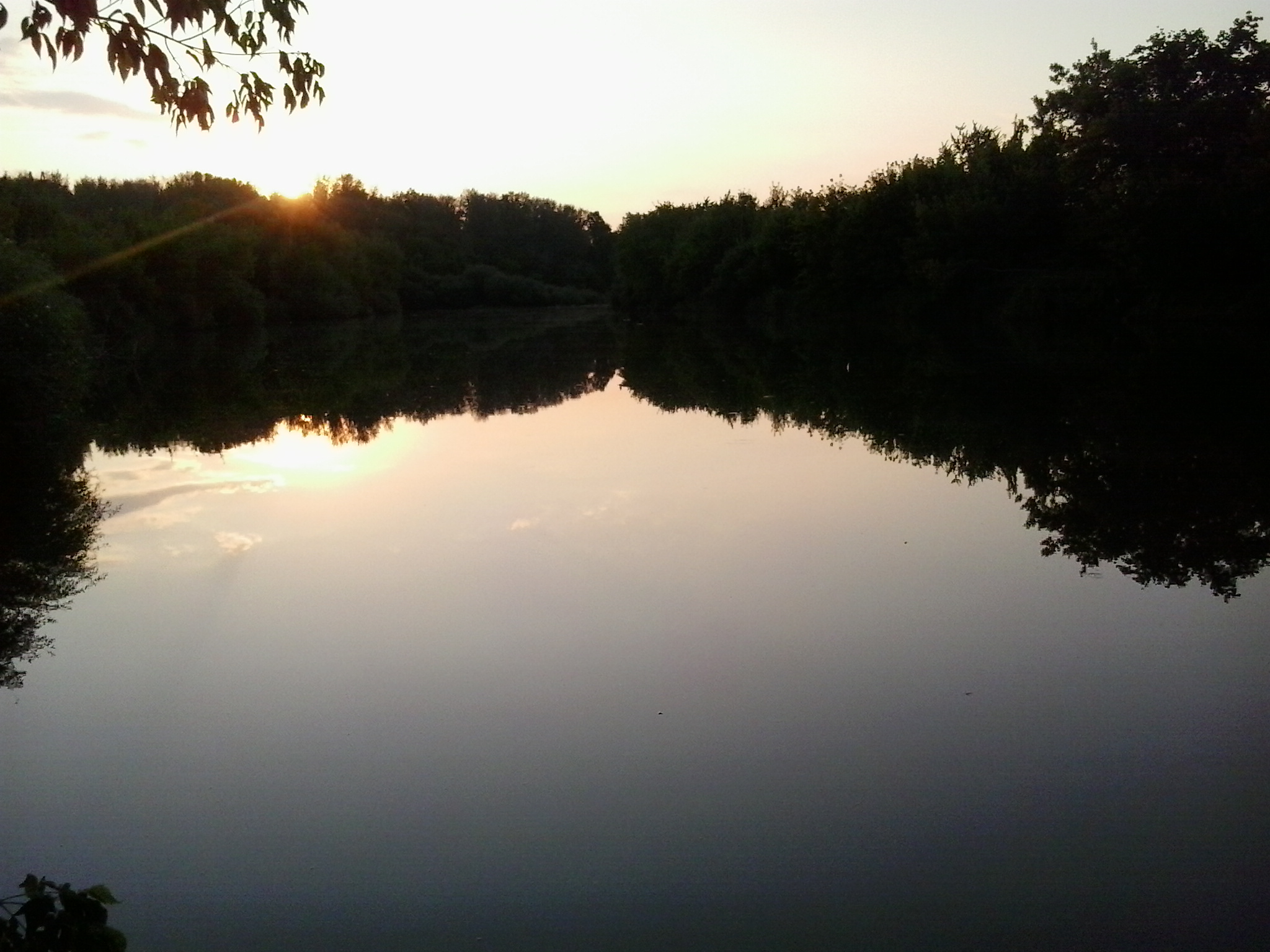 Озеро Лесное (искусственный водоем), находящийся на территории города Новотроицка Оренбургской области.